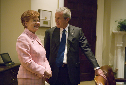 Vaira Vike-Freiberga and George W. Bush.